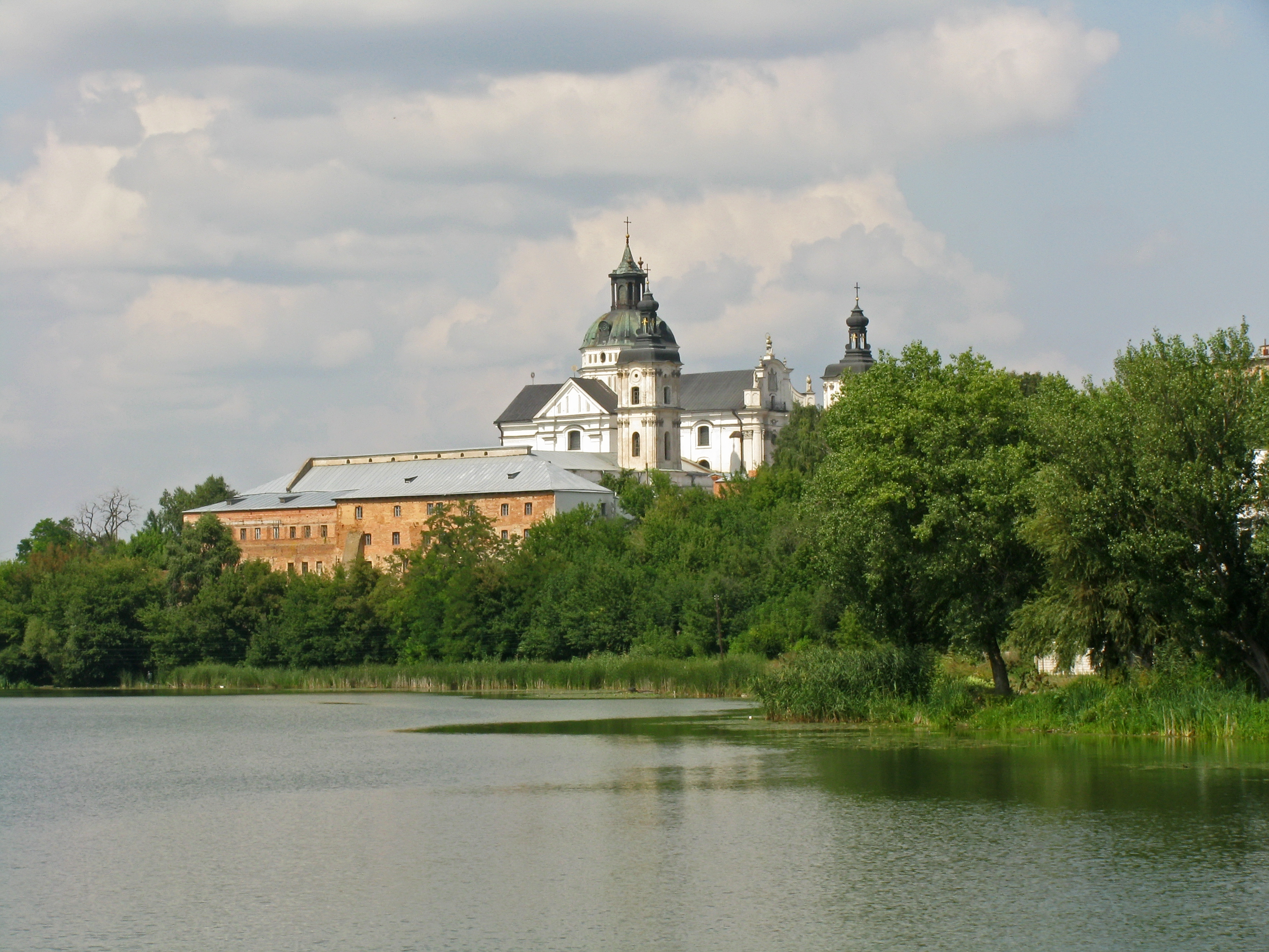 Кармелітський монастир (мур.):, Бердичів, Радянська пл.